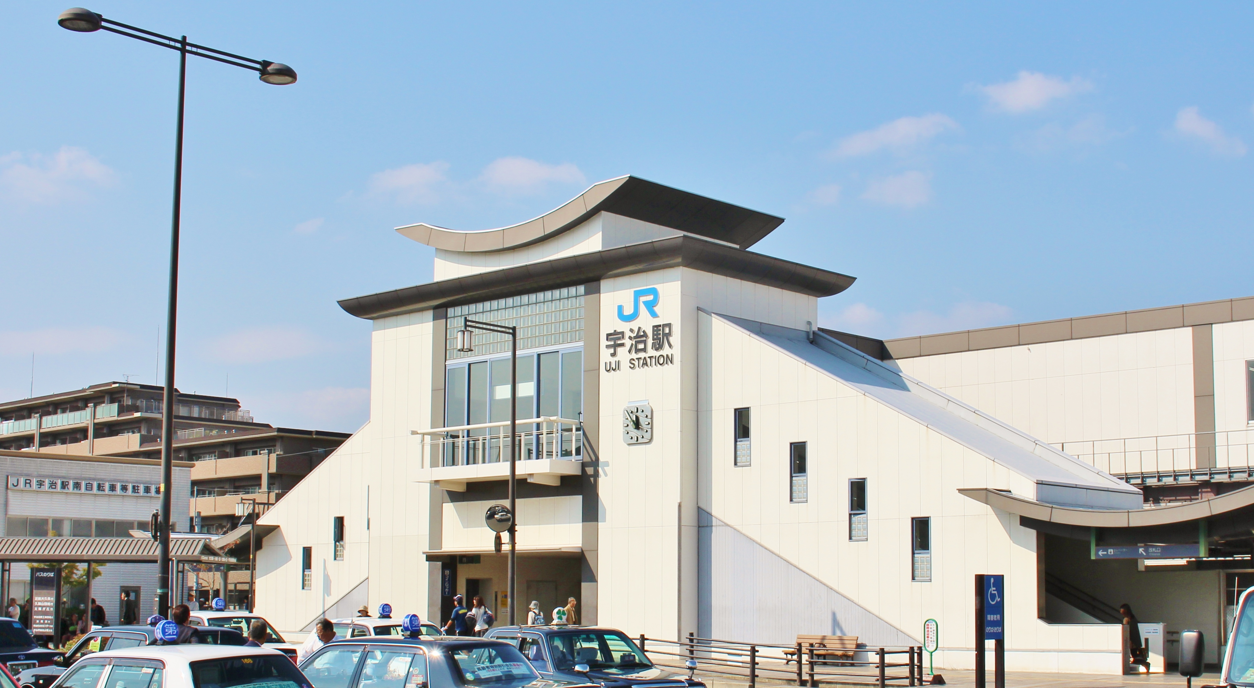 JR UJI STATION